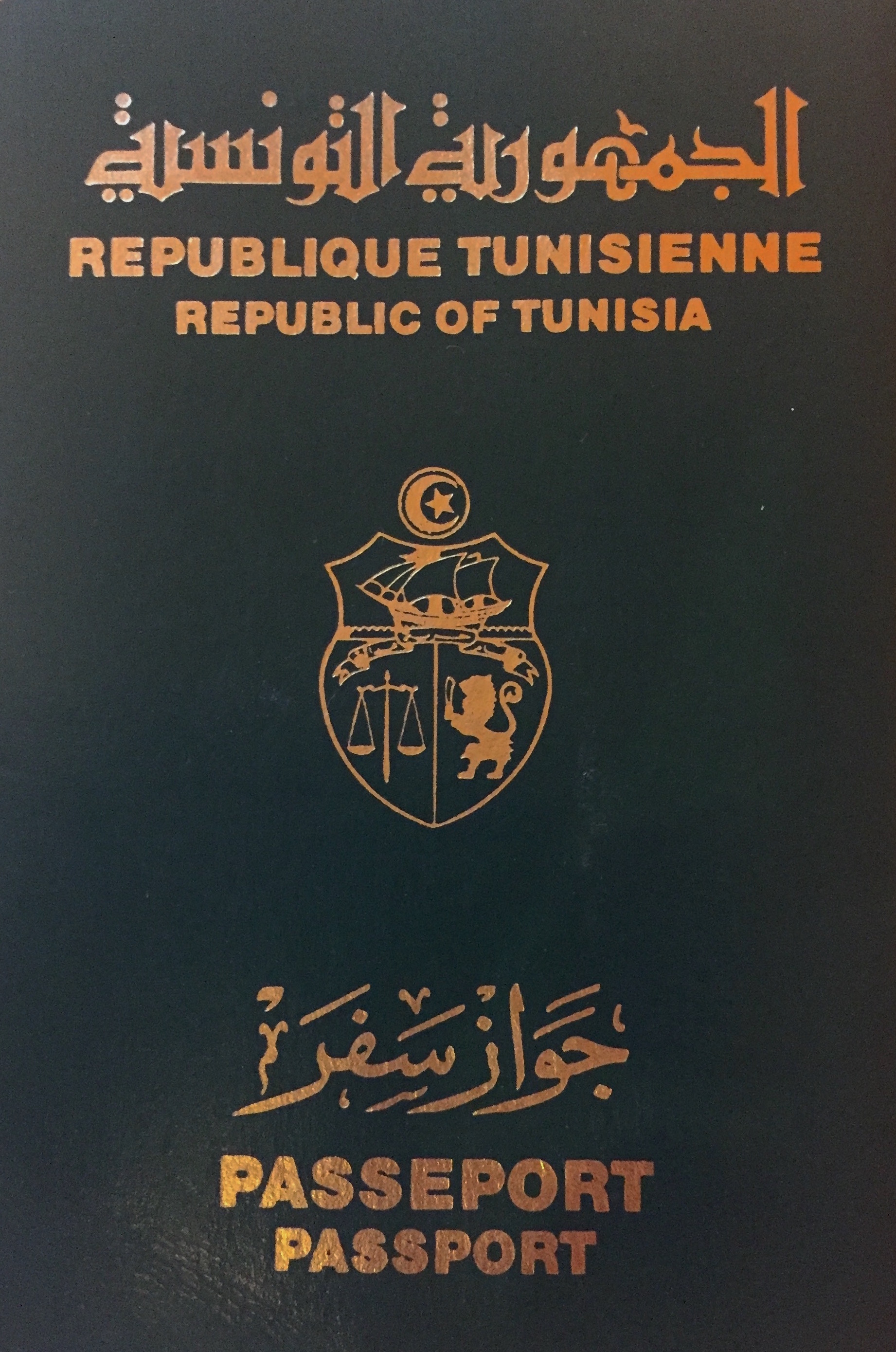 Couverture du passeport tunisien datant de 2014.